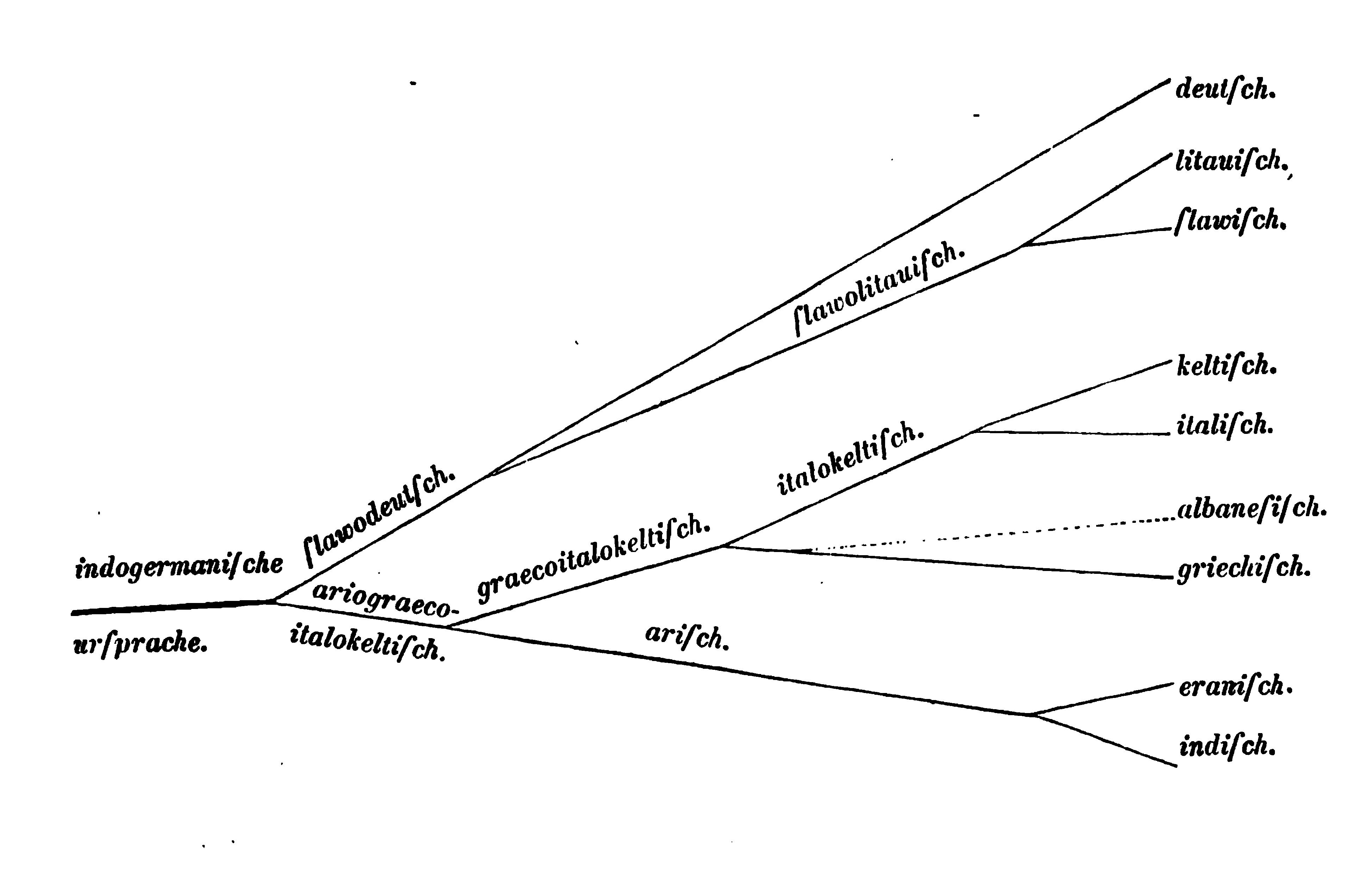 Graphic from Compendium der vergleichenden grammatik der indogermanischen sprachen.